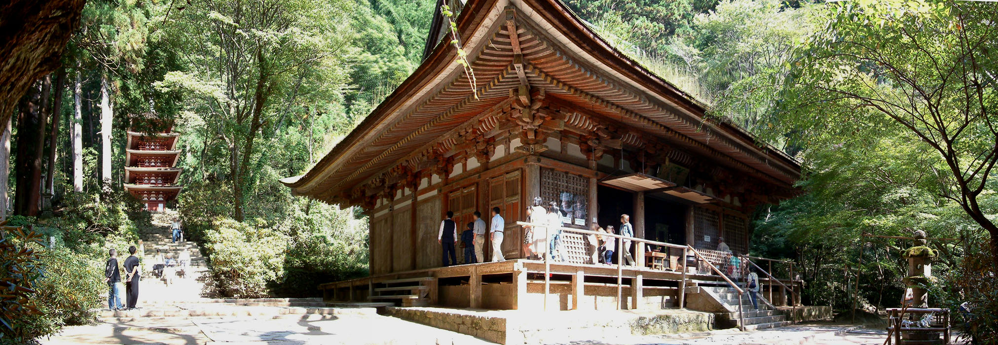 Murouji,室生寺 五重塔と本堂